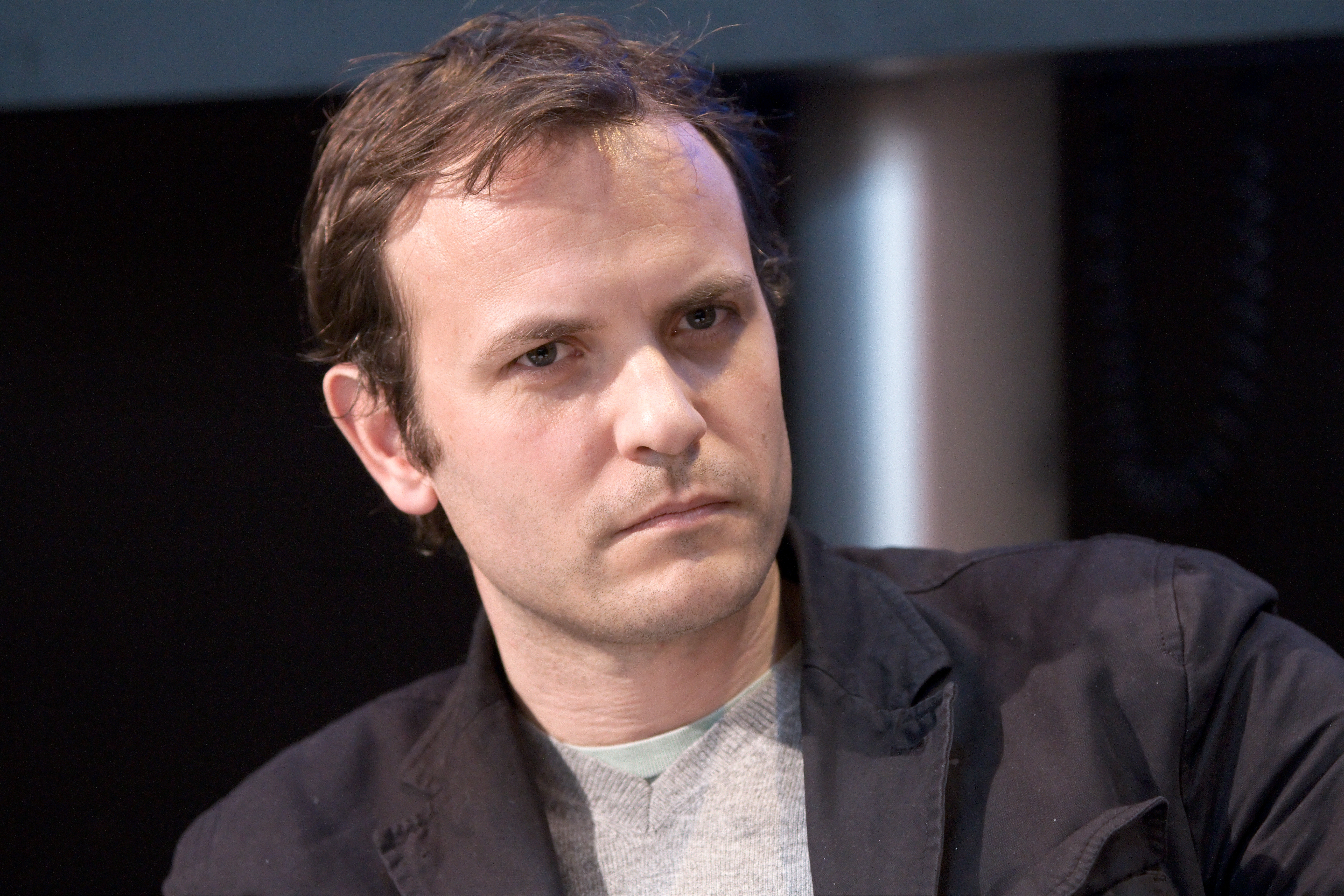 L'écrivain Timothée de Fombelle au Salon du livre de Paris pour la conférence Le théâtre, porte-parole de la littérature.